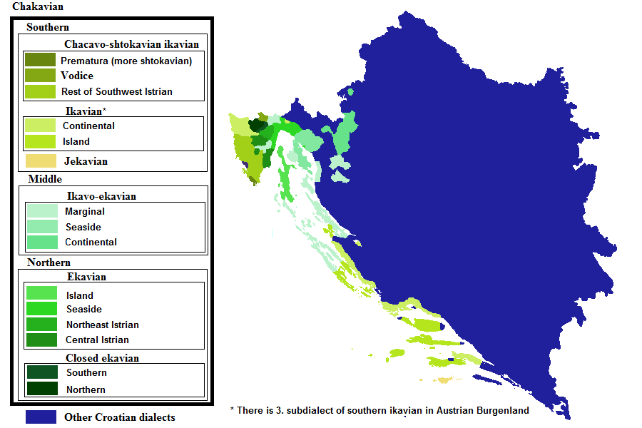 podijeljeni na poddijalekte po Liscu.